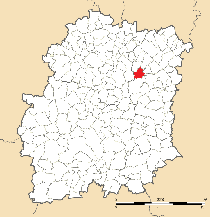 Carte de position de Bondoufle en Essonne (91)